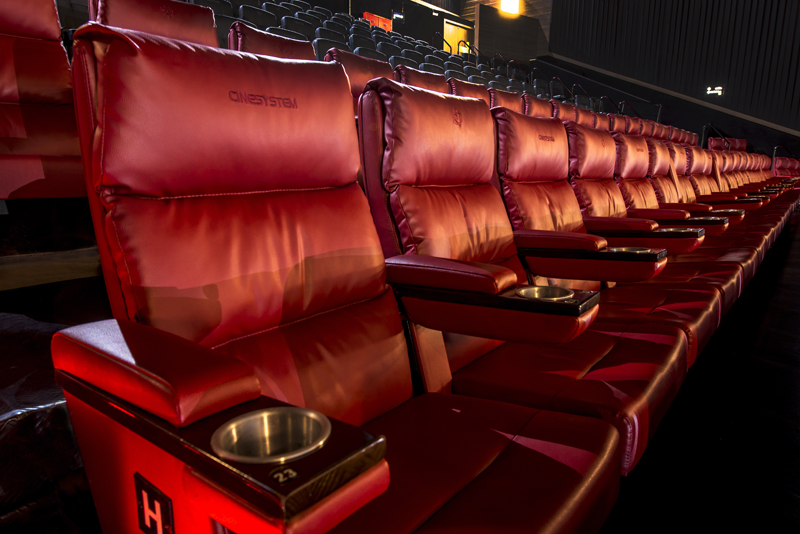 Salas com acesso para portadores de necessidades especiais e poltronas revestidas com couro ecológico, braços mais largos, reclináveis e namoradeiras.